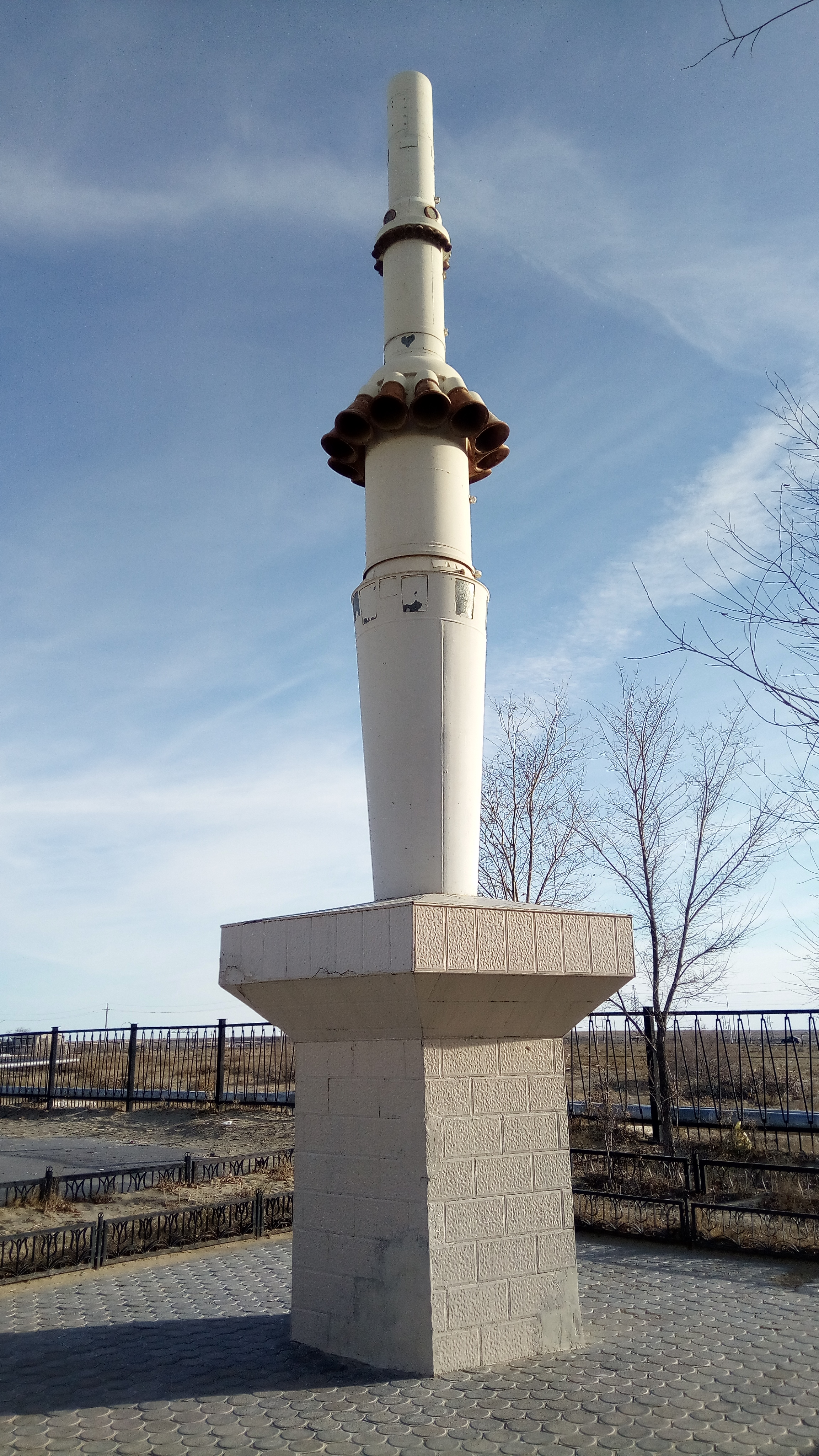 Памятник ДУ САС (Байконур)